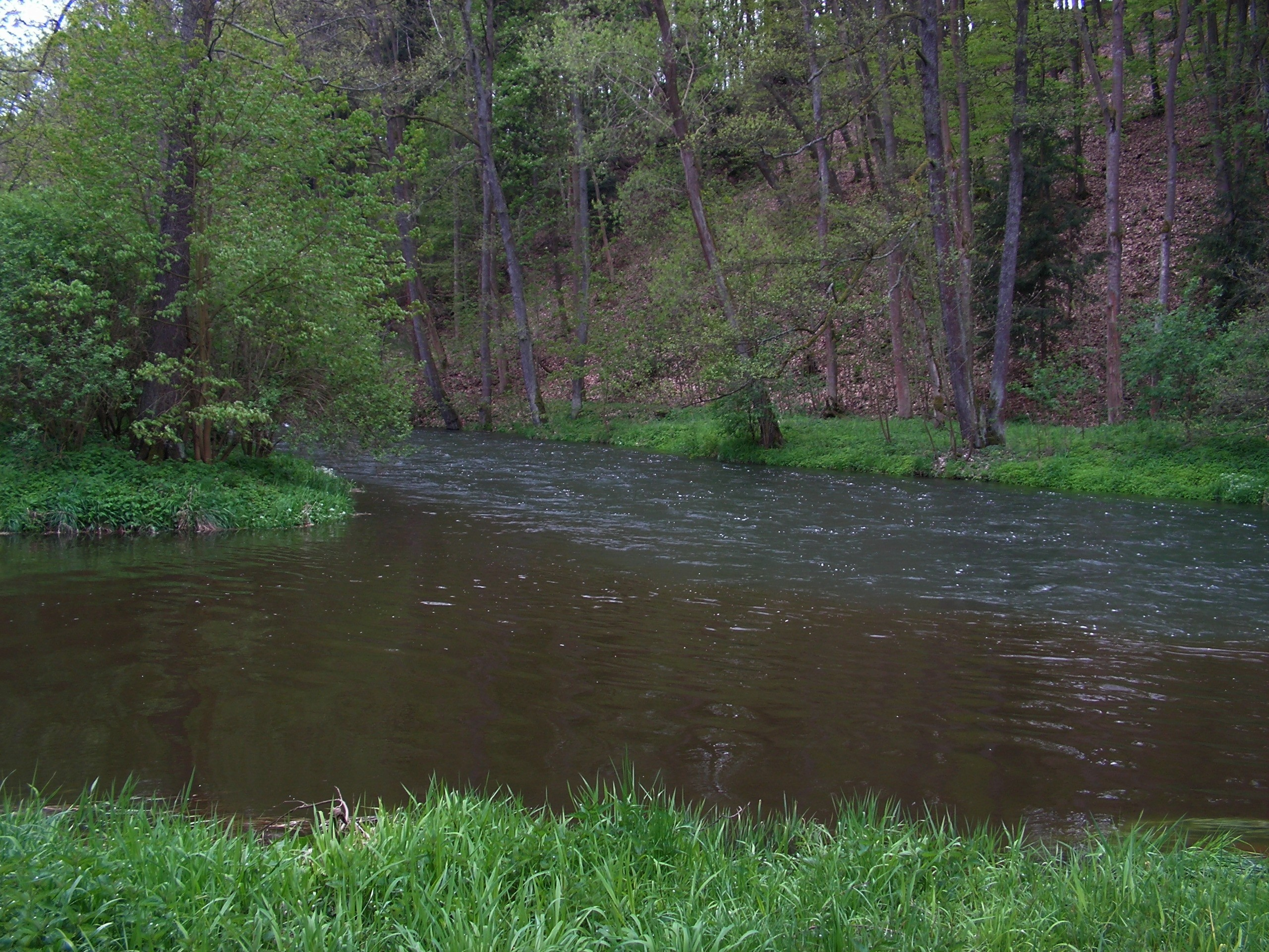 Soutok Želivky a Trnavy v Želivě v okrese Pelhřimov